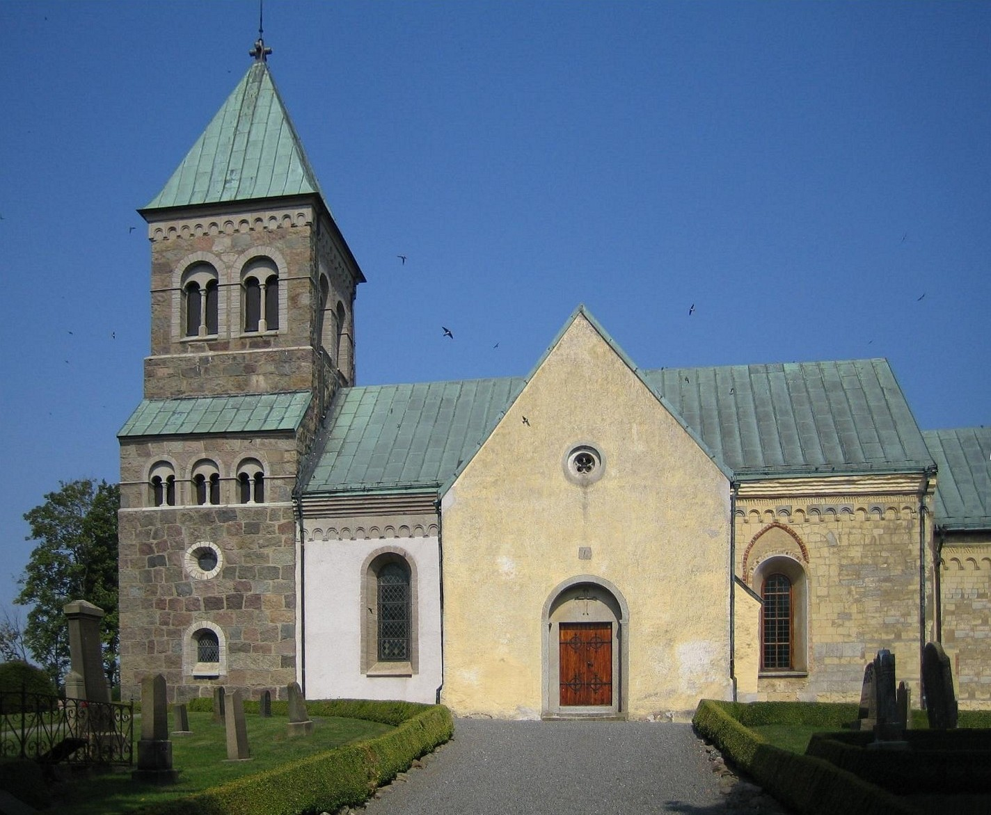 Bjäresjö kyrka. Bilden tagen av mig själv 21 augusti 2005.